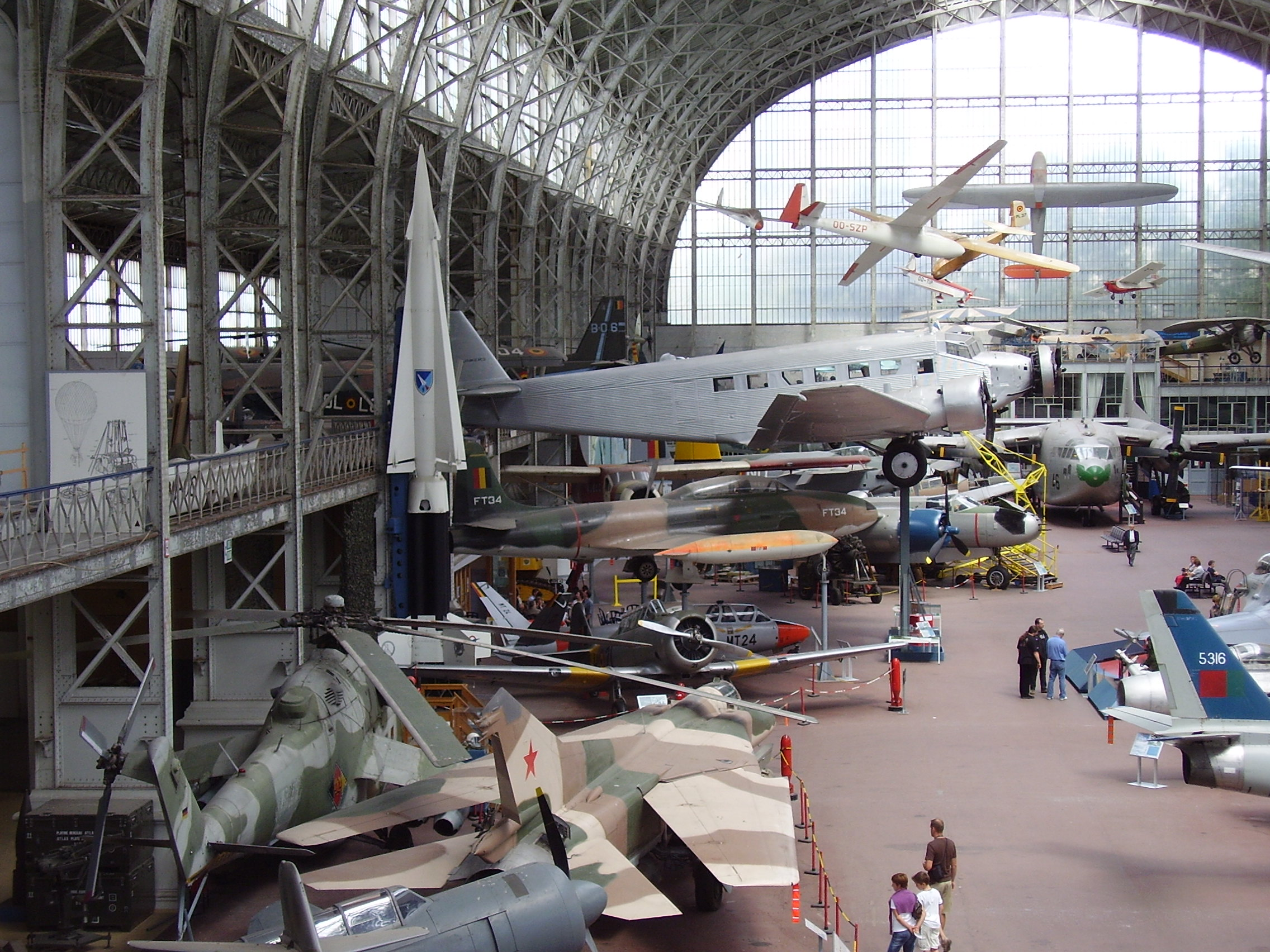 Royal Military Museum Brussels, Musée Royal de l'Armée, Koninklijk Museum van het Leger en de Krijgsgeschiedenis